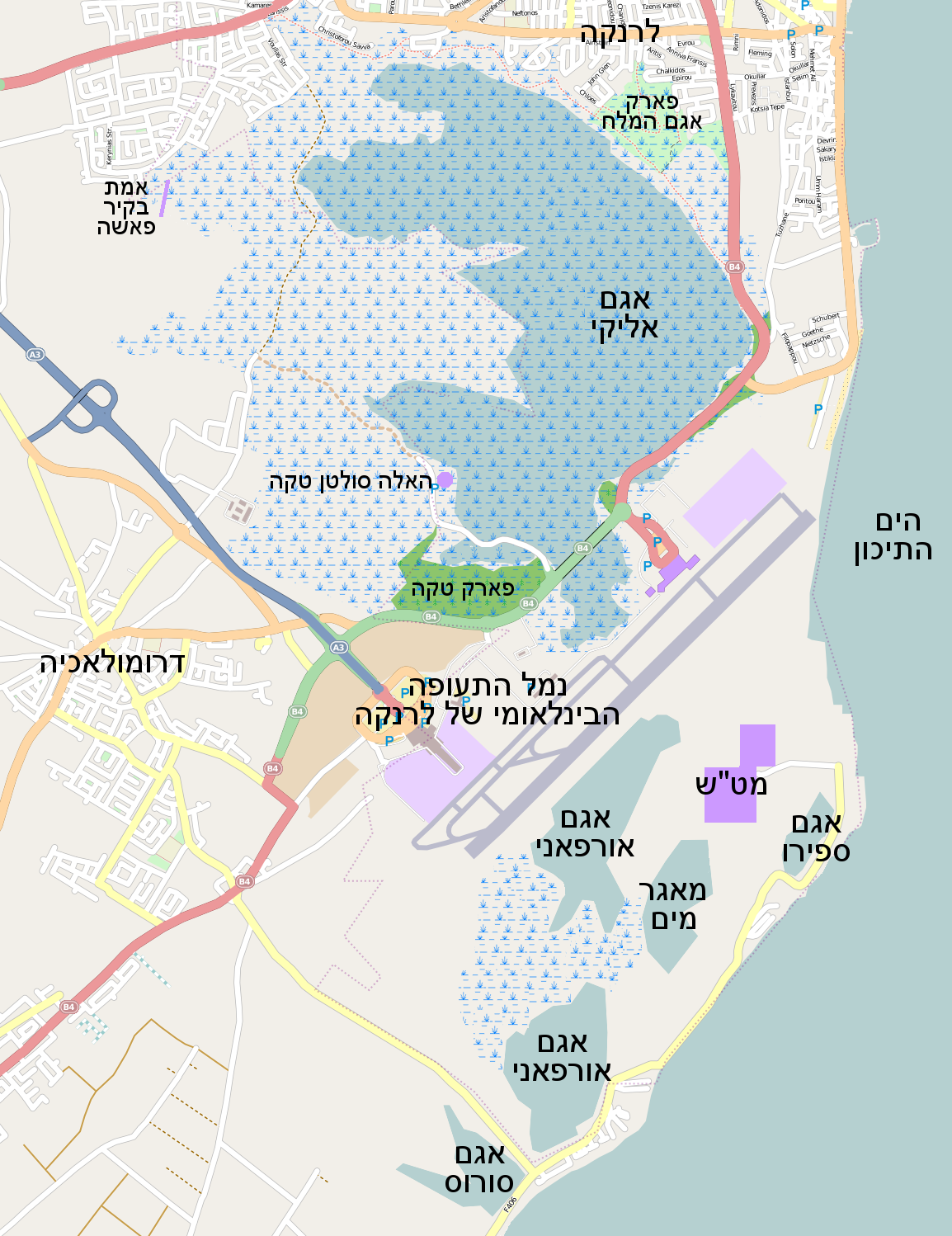 Larnaka salt lakes map